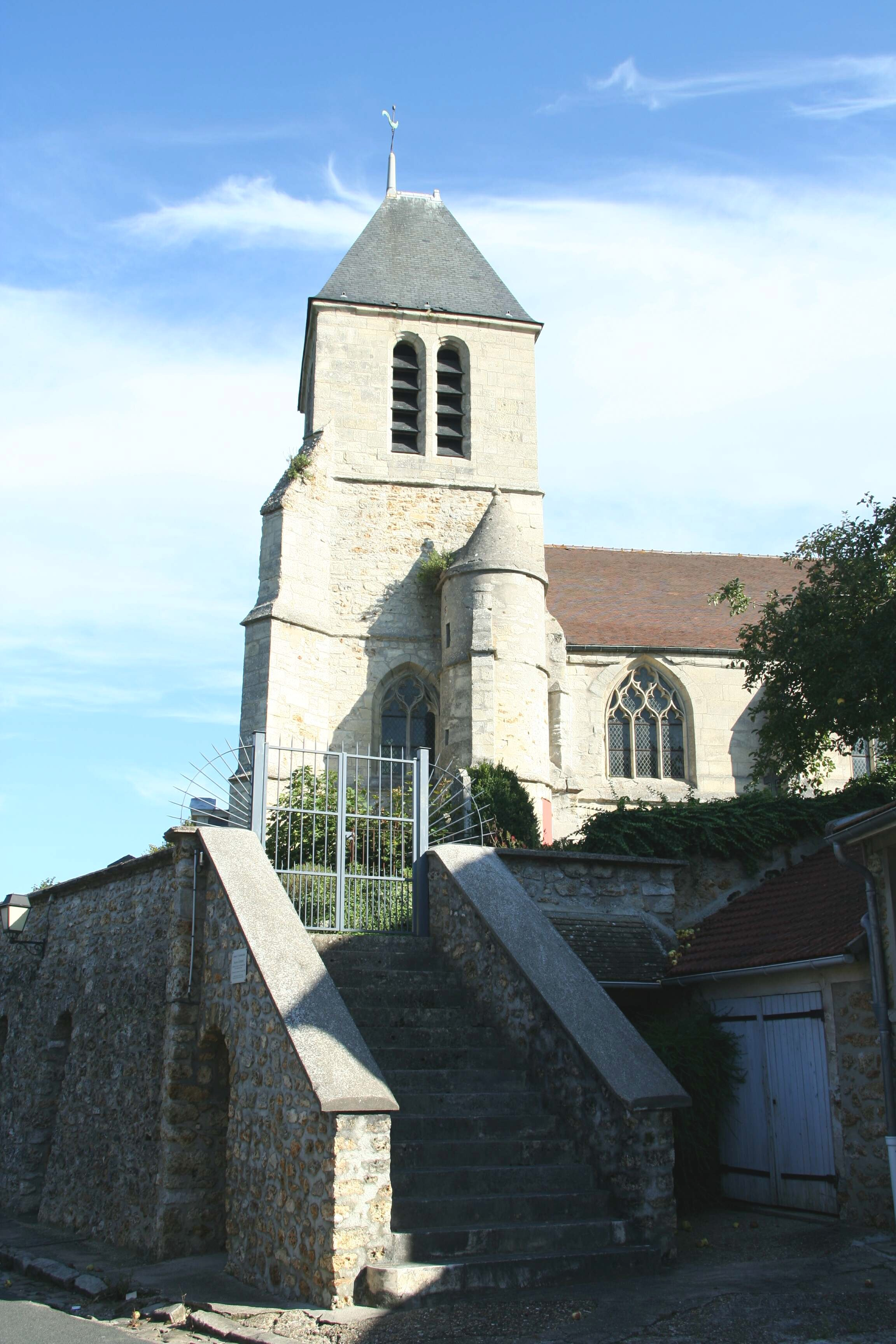 Église de Lainville-en-Vexin - Yvelines (France)